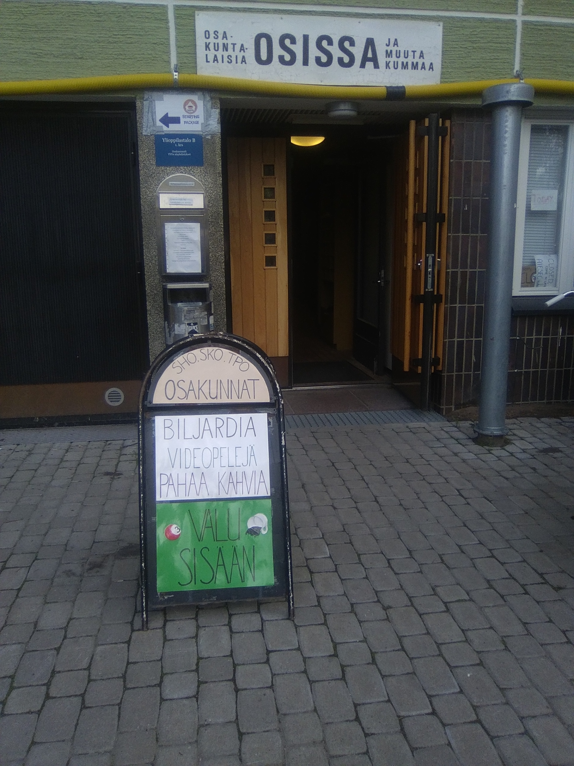 Ulos nostettu kyltti kertoo osakuntatilan aukiolosta.